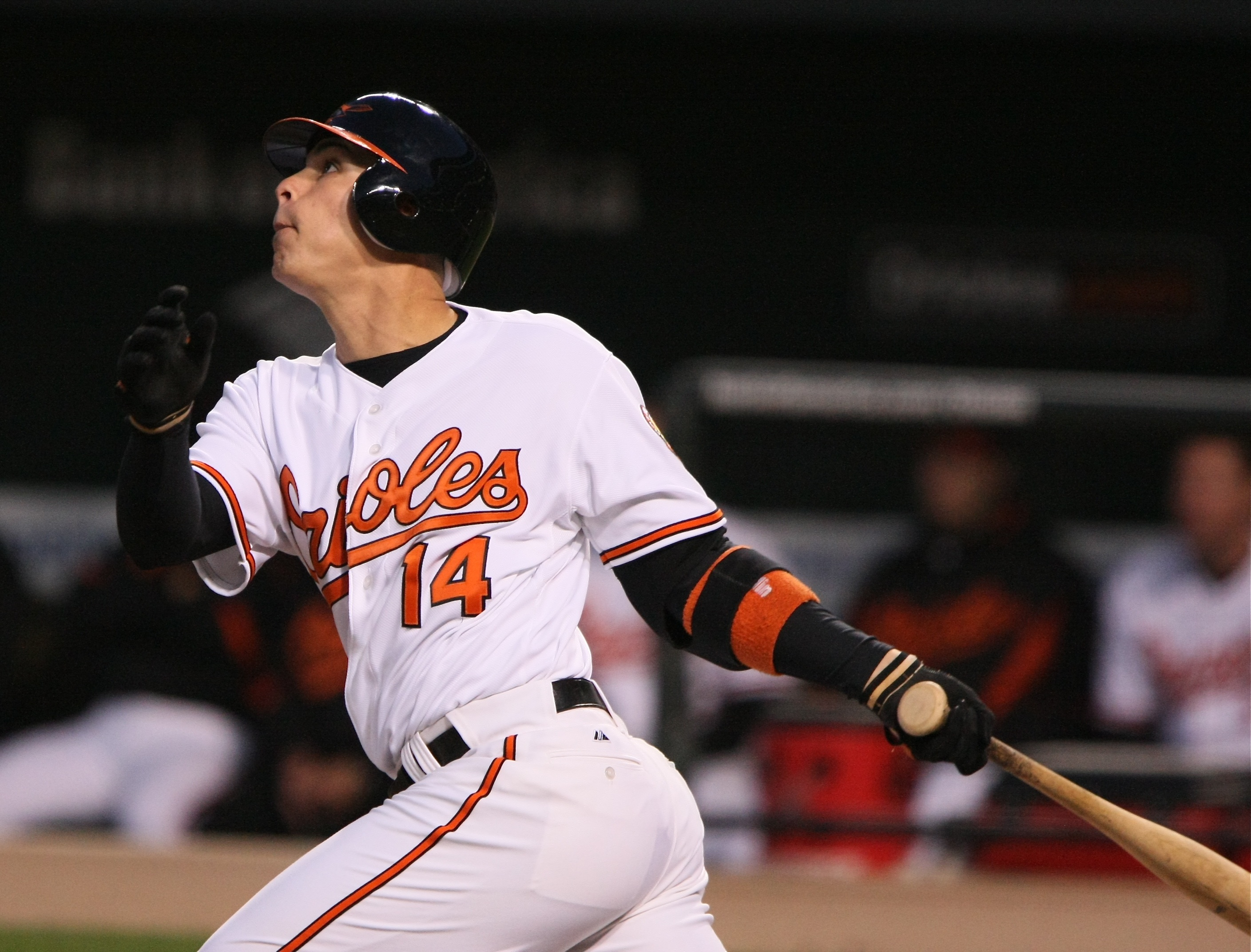 Lou Montañez